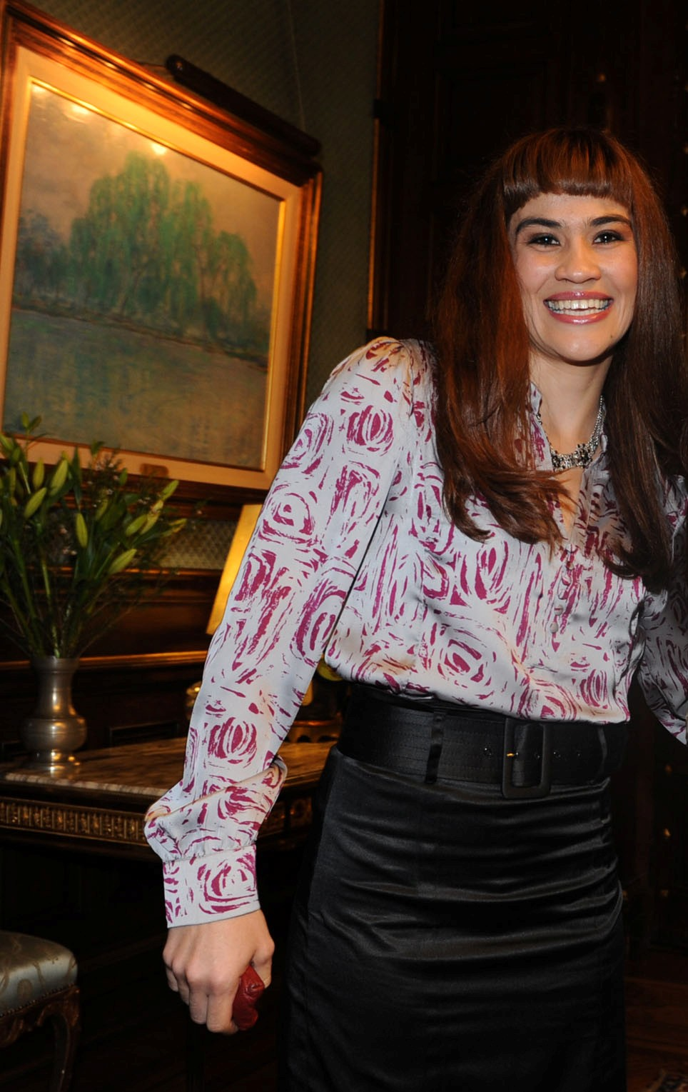 La Tigresa Acuña